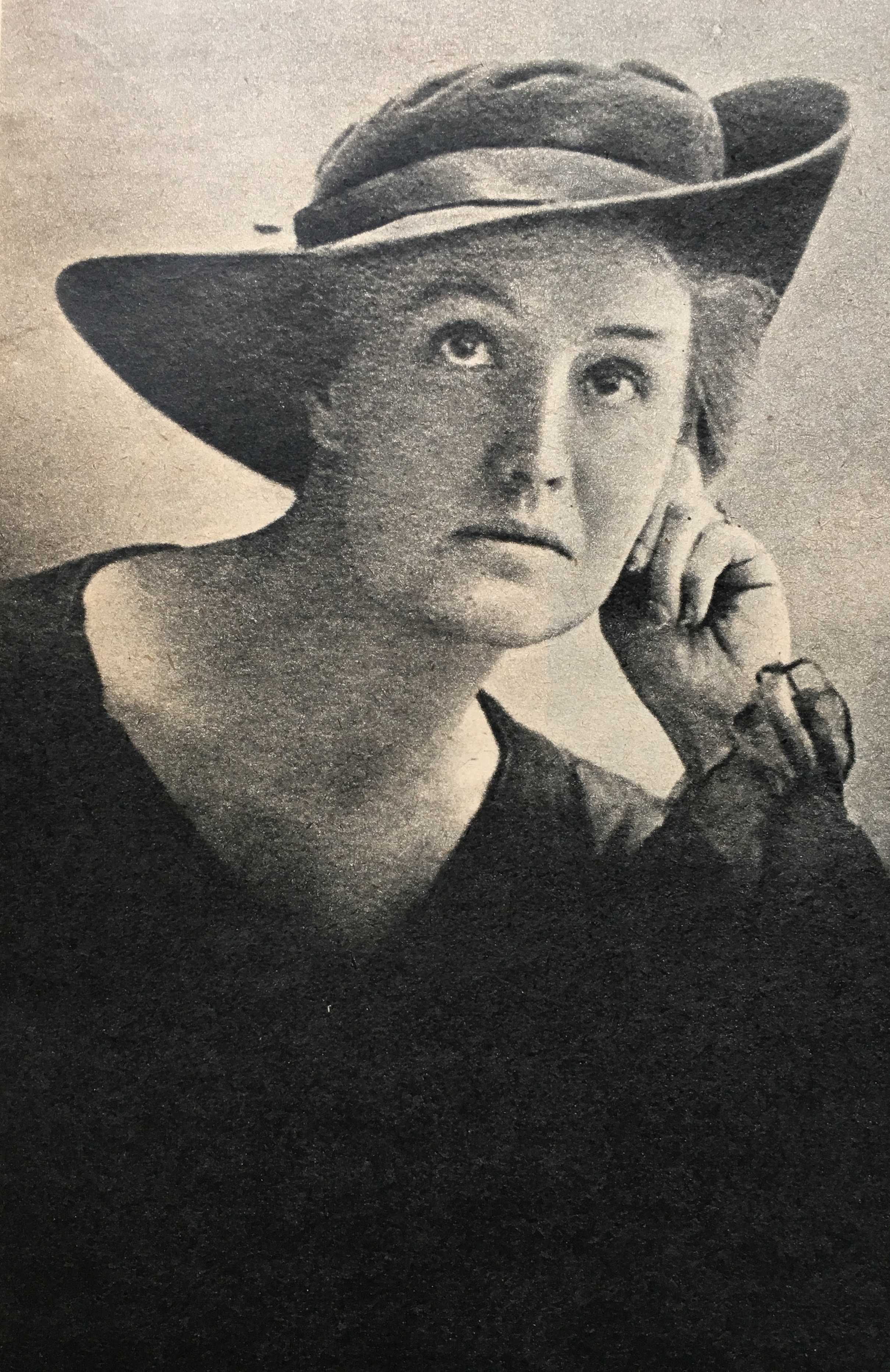 Sibilla Aleramo, Firenze 1917